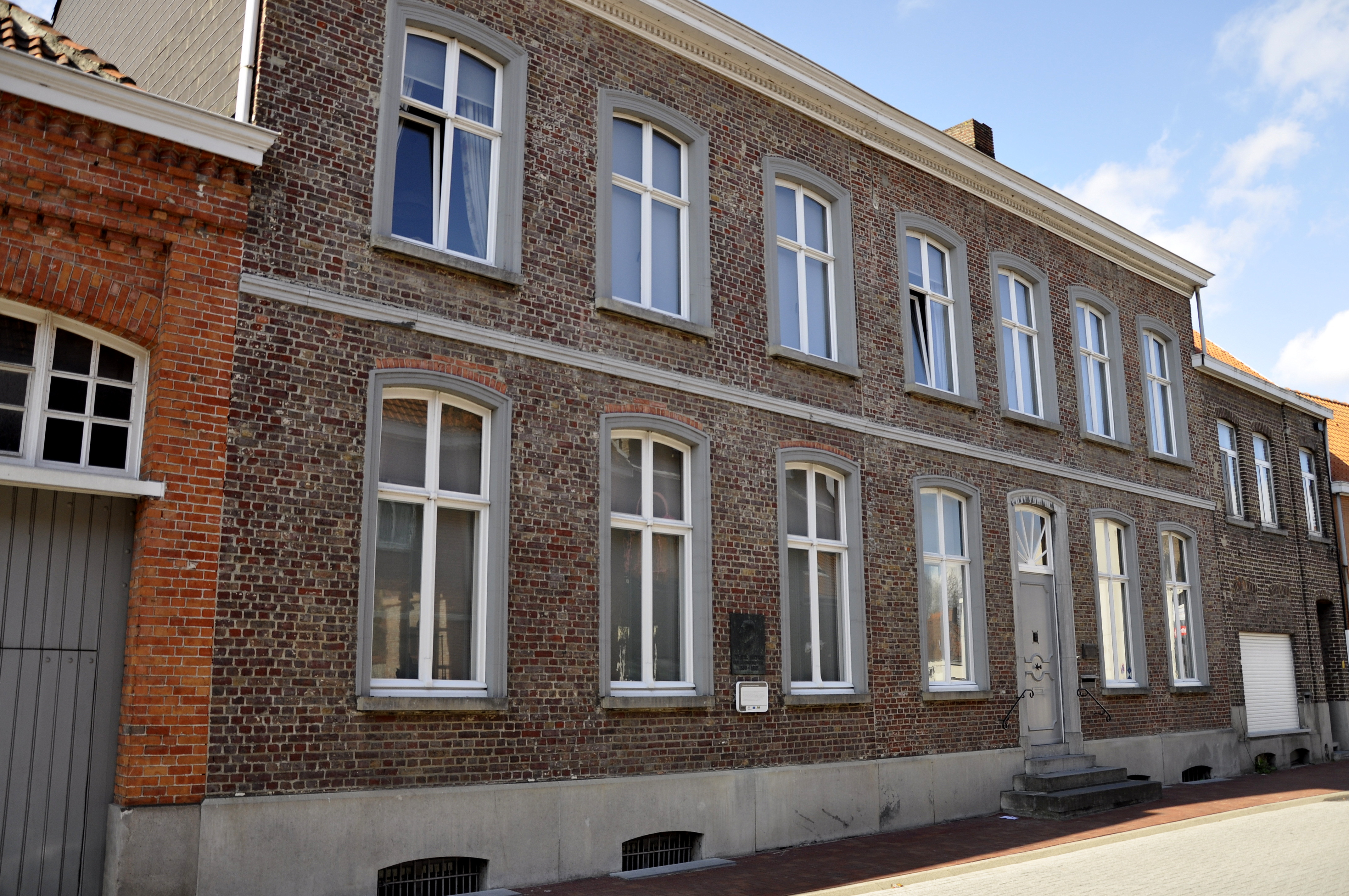 Nevele, woonhuis van Cyriel Buysse van 1865 tot 1896, voormalige stijfsel- en oliemakerij, later chicoreifabriek Buysse-Loveling, stopgezet in 1971. Cyriel Buyssestraat 38, Nevele